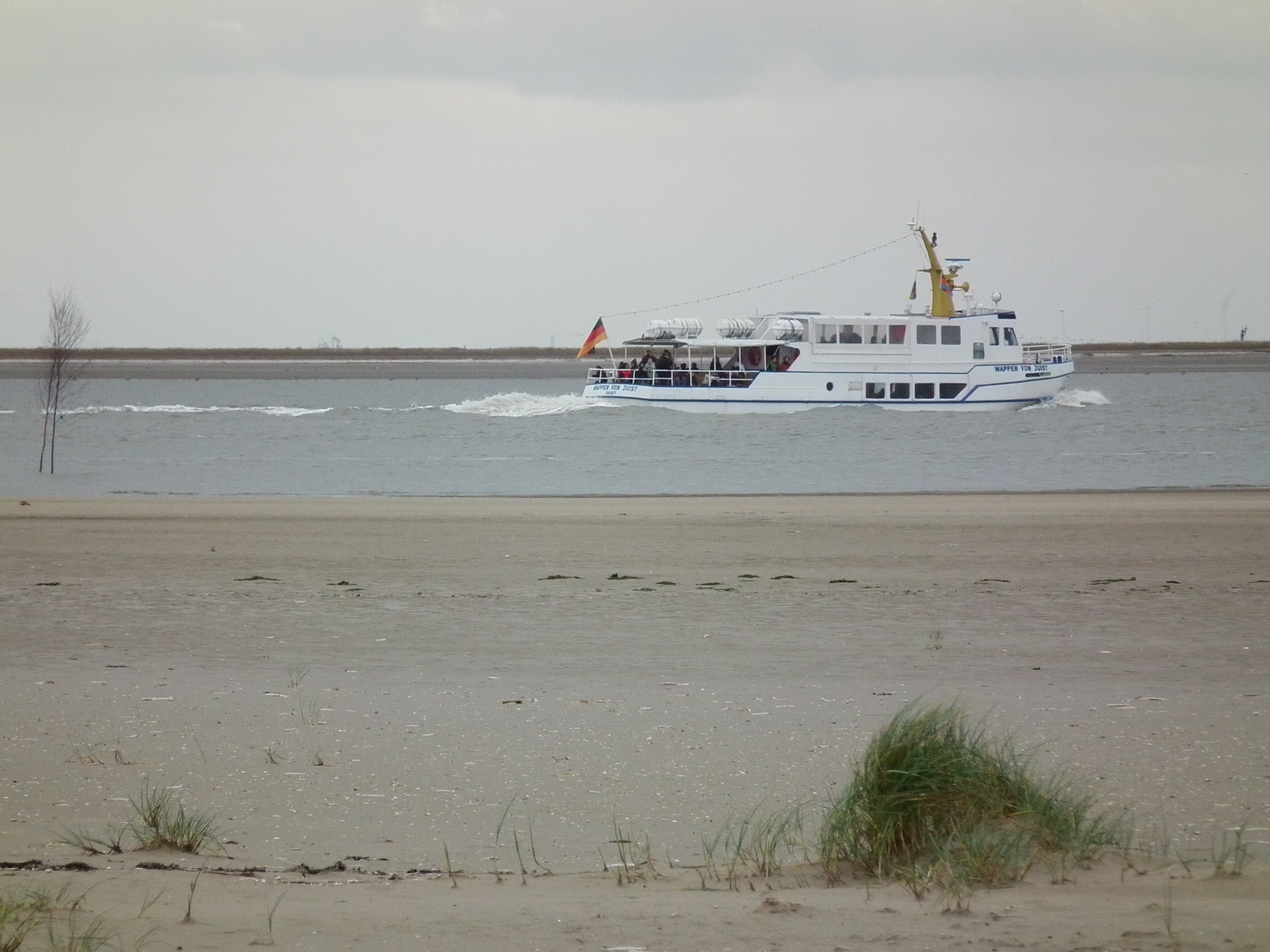 "Wappen von Juist" bei einer Ausflugsfahrt zu den Seehundsbänken vor der ostfriesischen Nordseeinsel Juist (Niedersachsen, Deutschland)